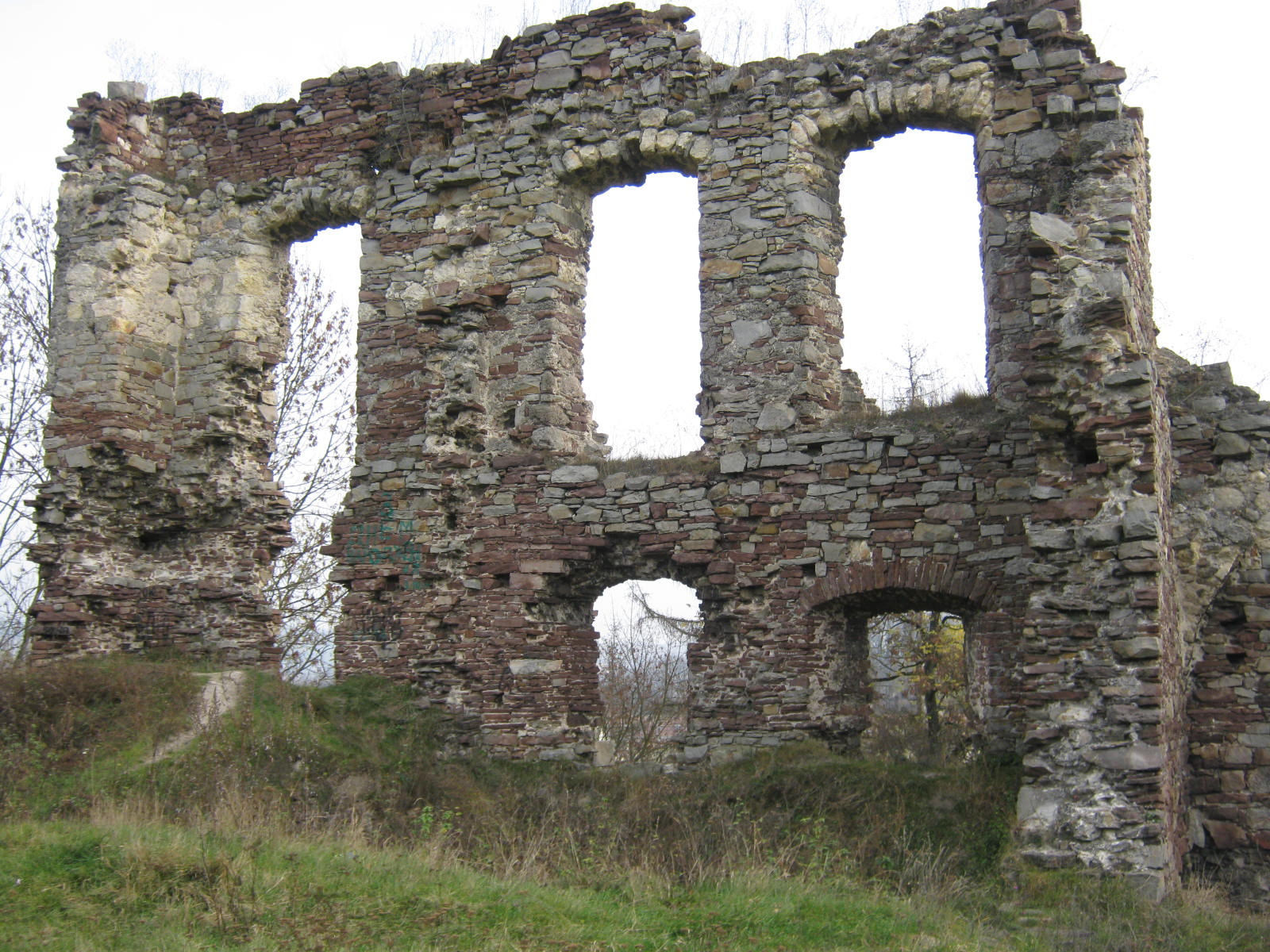 Руїни житла. Фортеця. Бучач